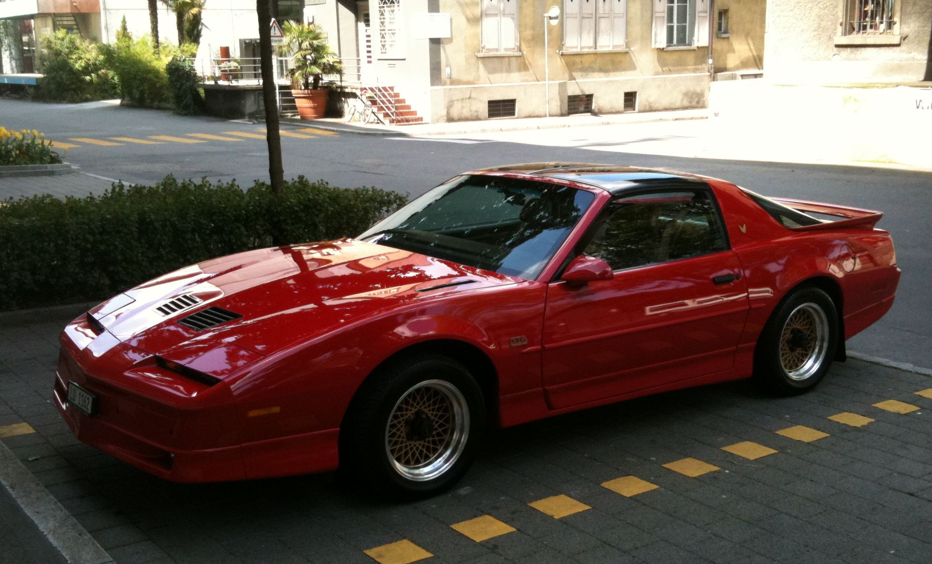 Pontiac Trans AM GTA 5.7L A4 89